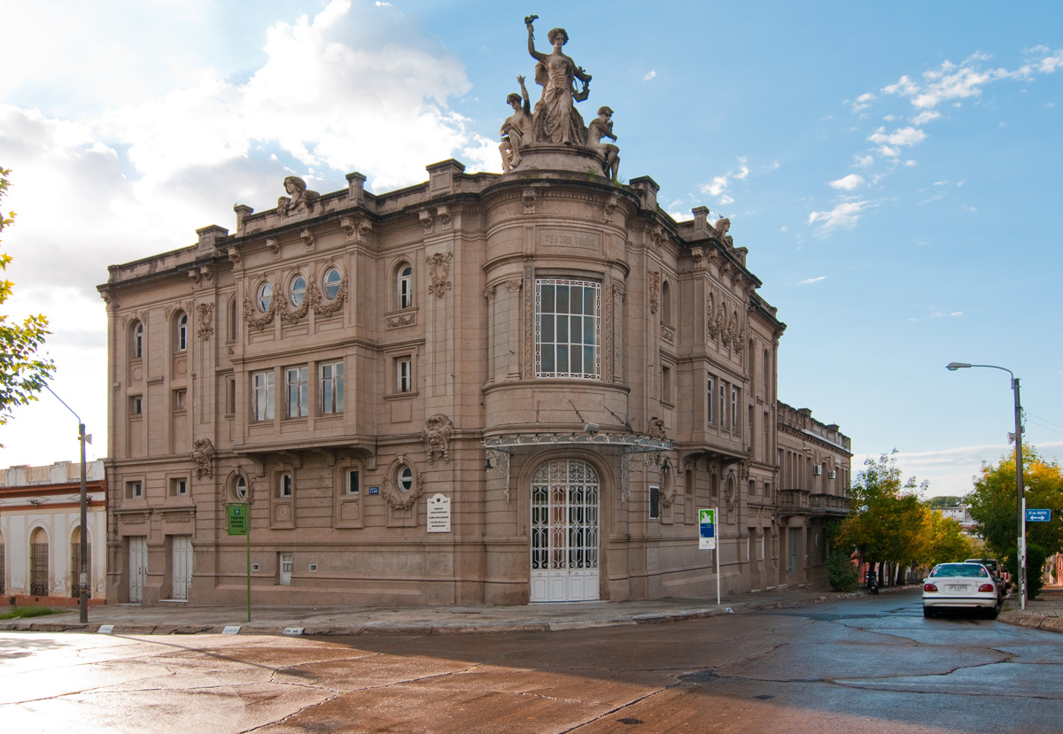 Teatro Municipal Miguel Young. Ubicada en el departamento de Río Negro